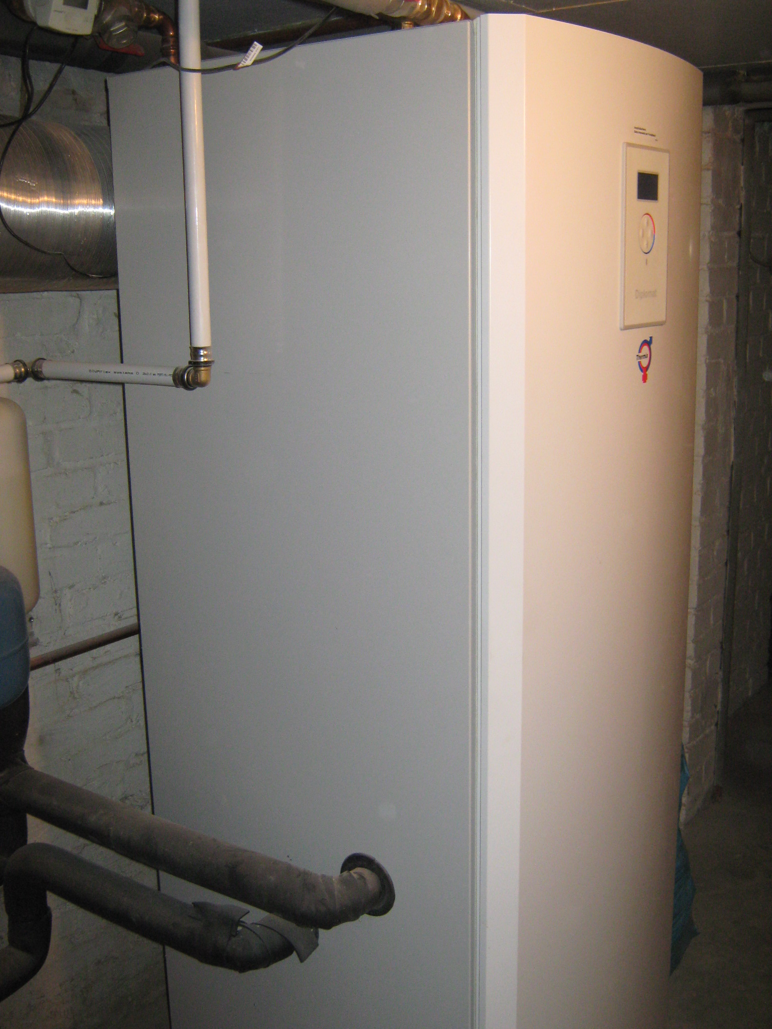 Wärmepumpe im Bestandsbau (Zweifamilienhaus Bj. 1954) eingebaut 2009 im Zuge einer energetischen Sanierung des Gebäudes.